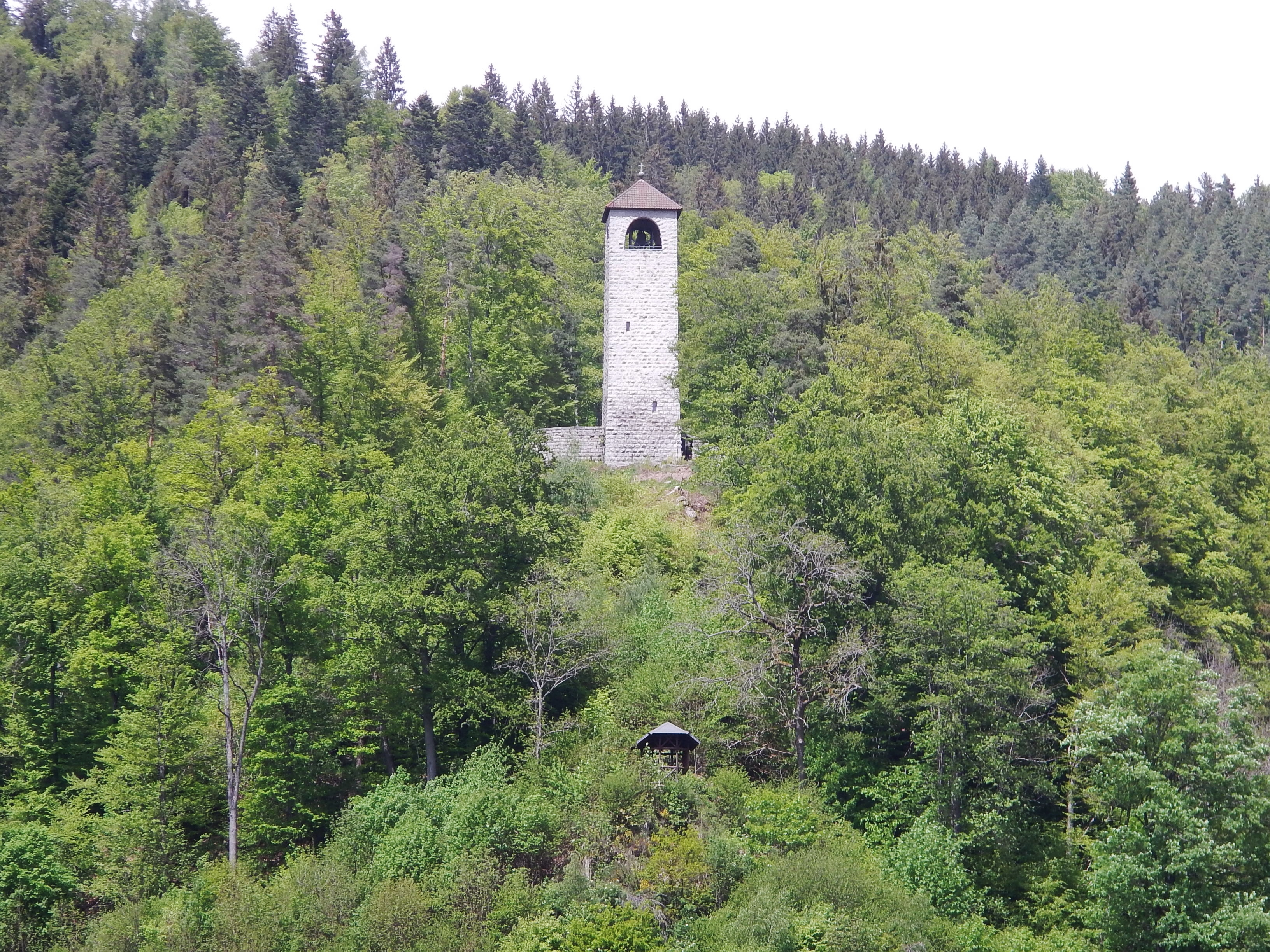 Kriegerdenkmal und Aussichtsturm ... eine Gedenkstätte am Panoramaweg: 1930 erbaut